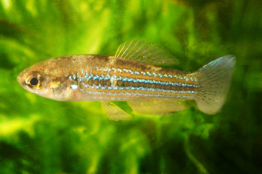 Ejemplar colectado cerca del Canal de los Patos en la Cienaga de Zapata